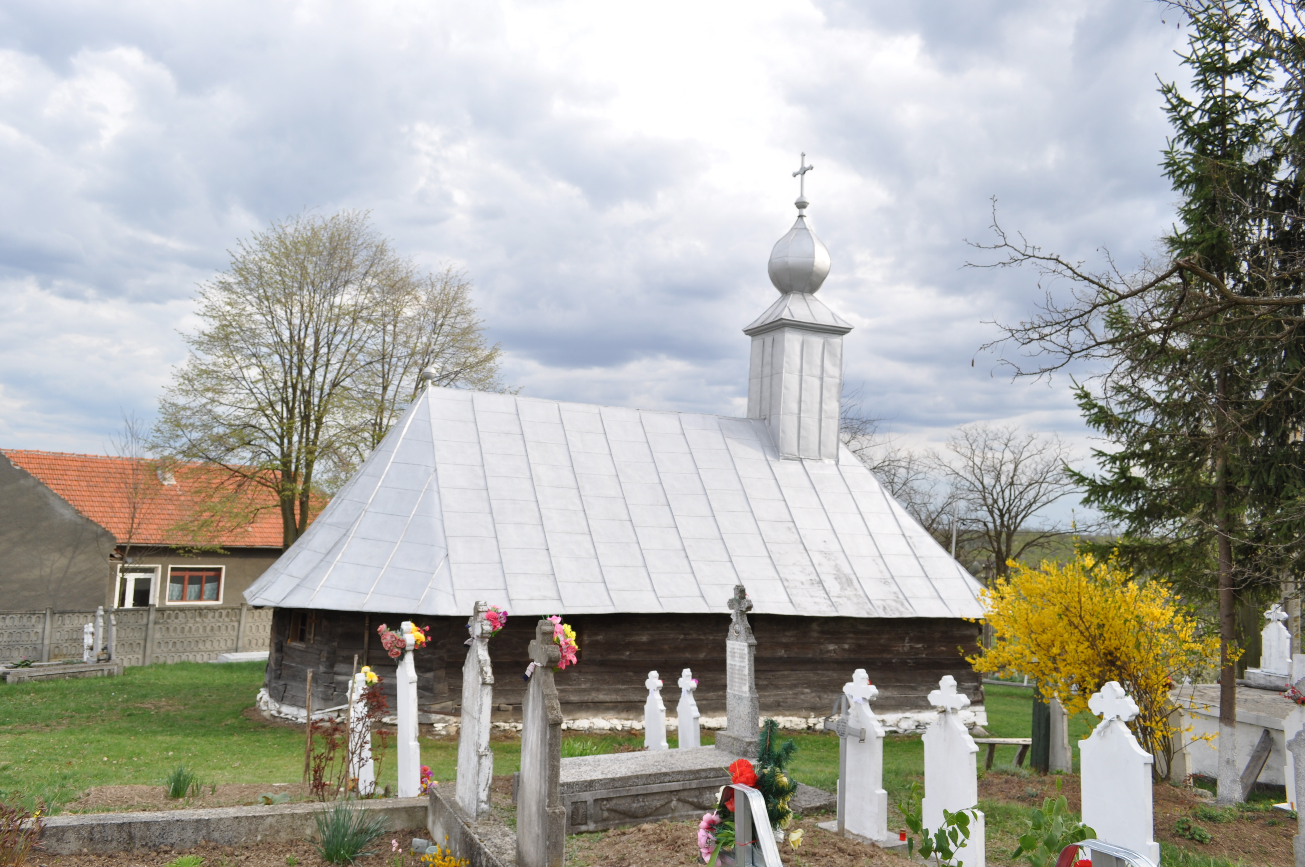 Biserica de lemn "Sfântul Dumitru" , sat DUBEŞTI; comuna OHABA LUNGĂ